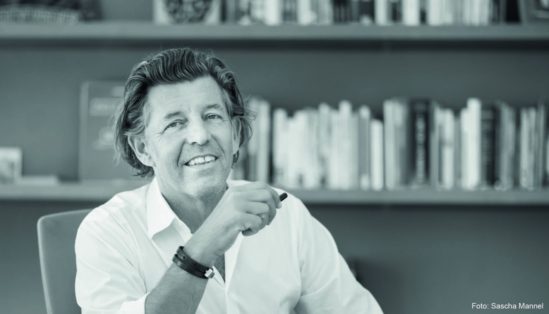 Prof. Dr. Gerdum Enders - Experte für Zukunftsstrategie, Kassel